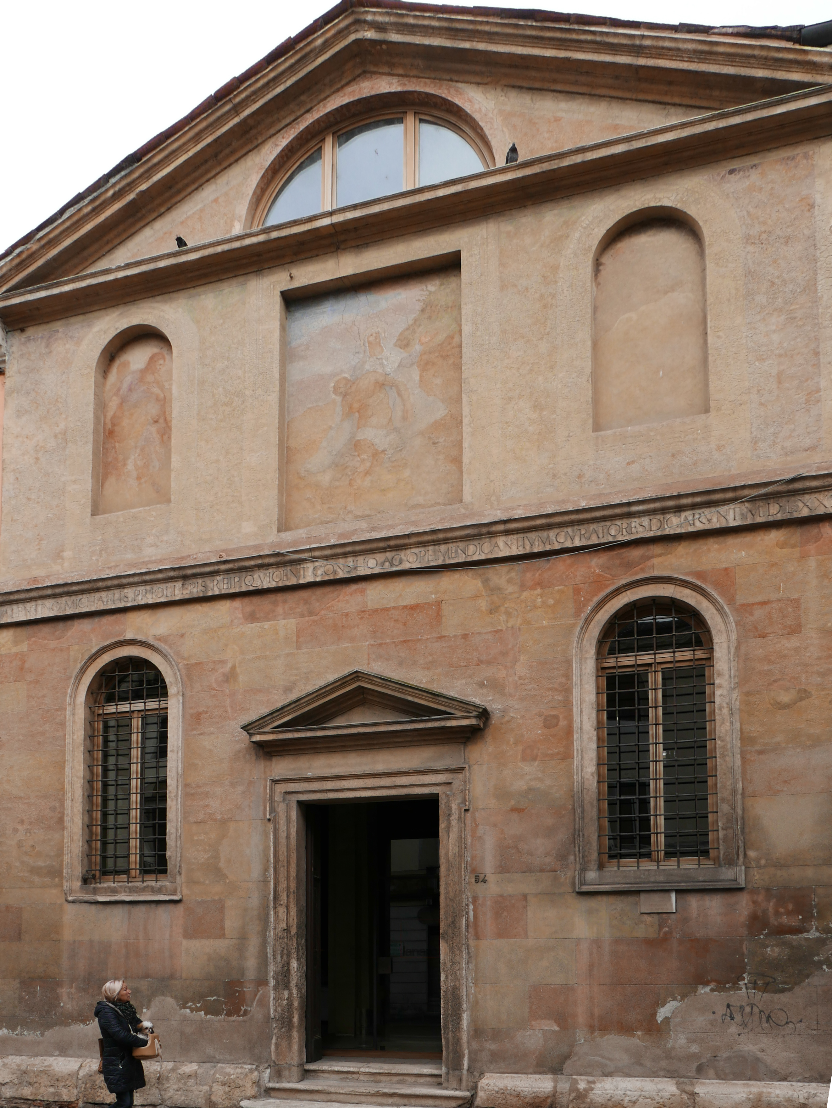 Dettaglio della facciata